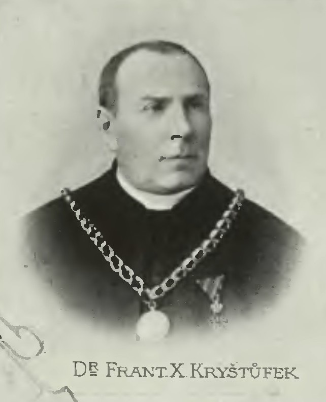 Portrét – František Xaver Kryštůfek (1842-1916), Český římskokatolický kněz a profesor.